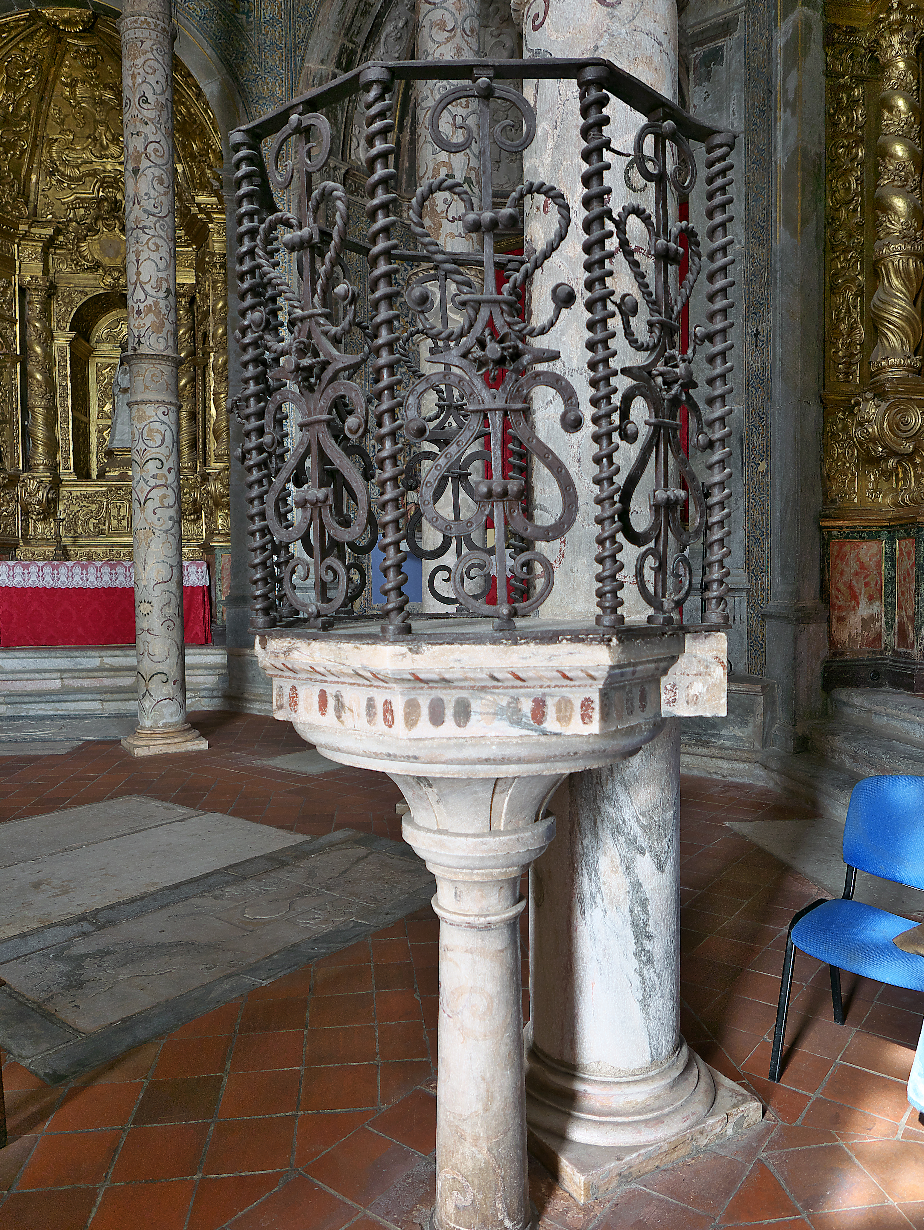 Detalle del púlpito.